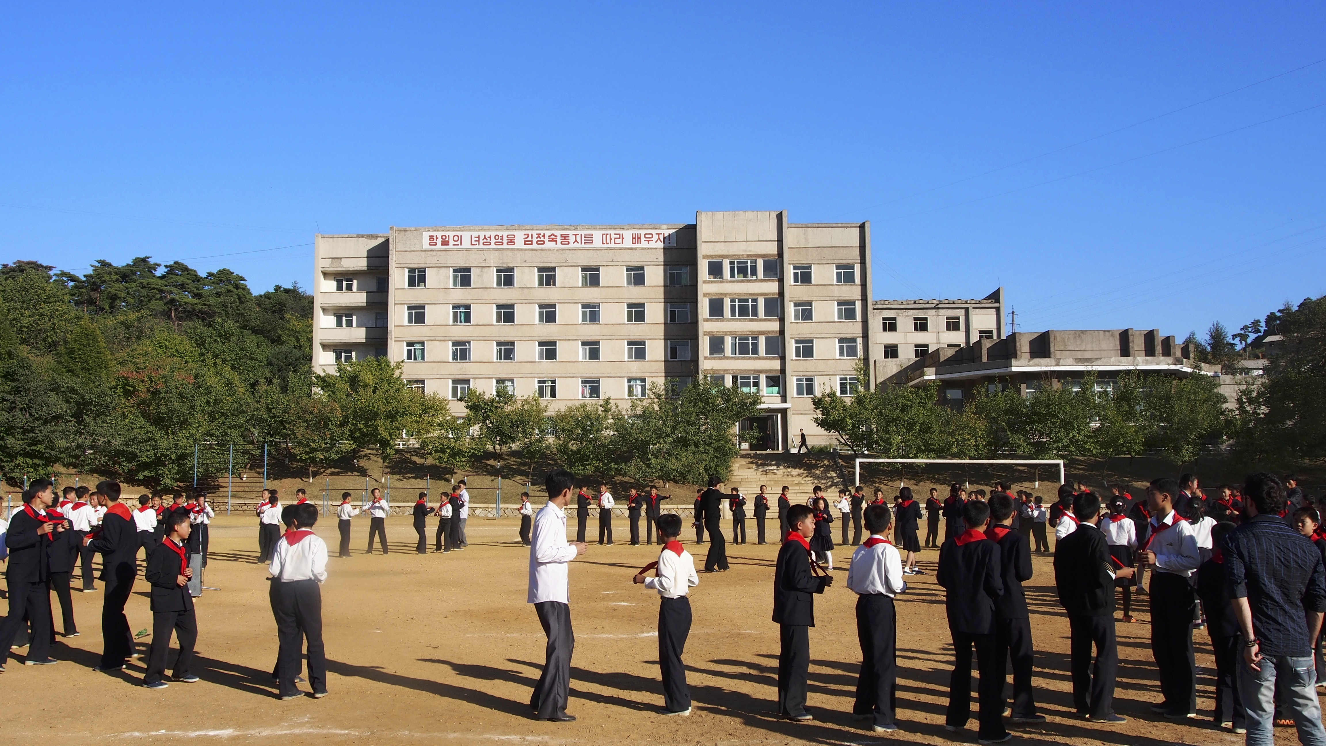 Pyongsong Middle School No 1